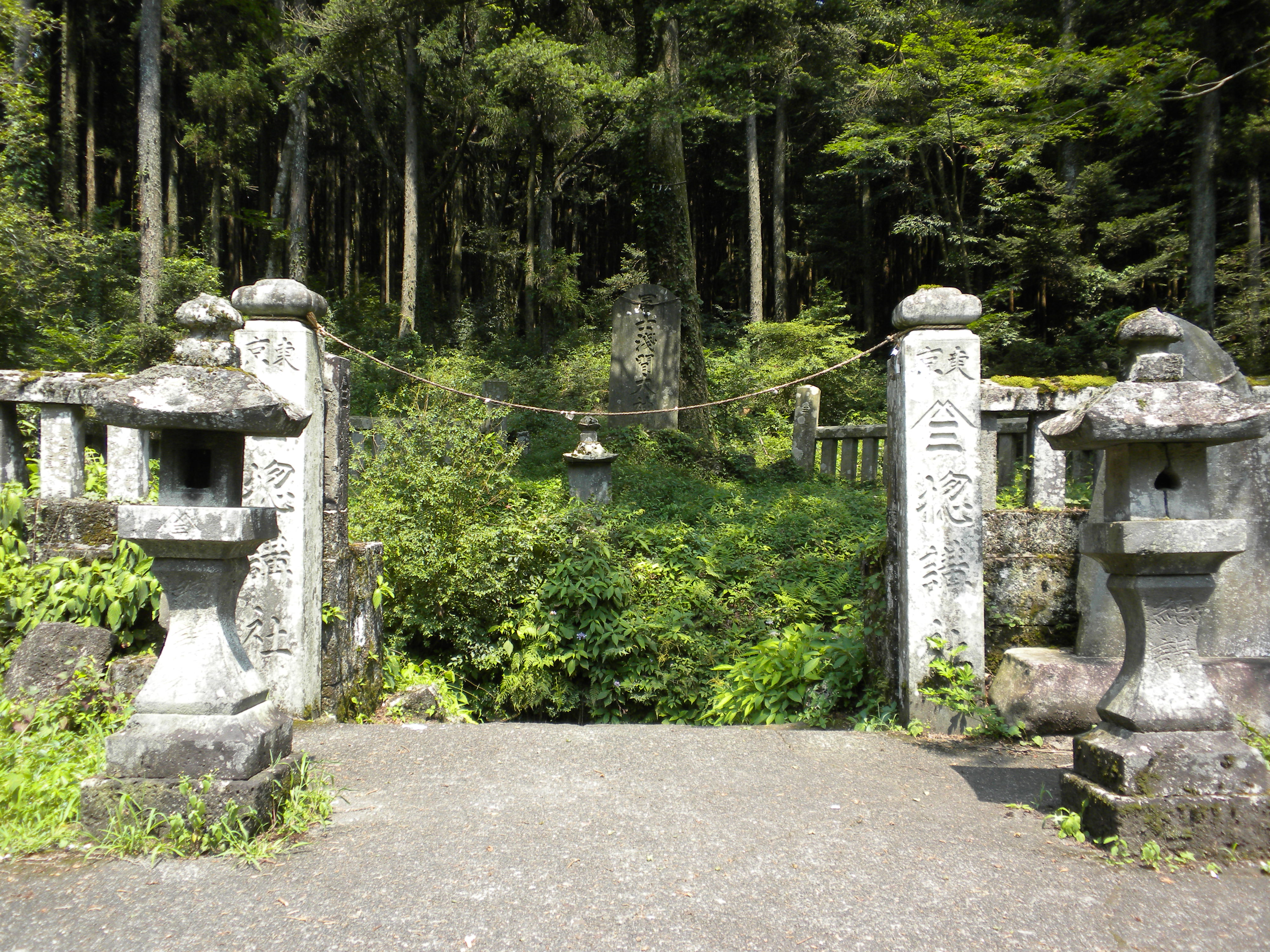 人穴富士講遺跡の人穴